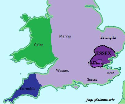 Mapa de situación del Reino de Essex